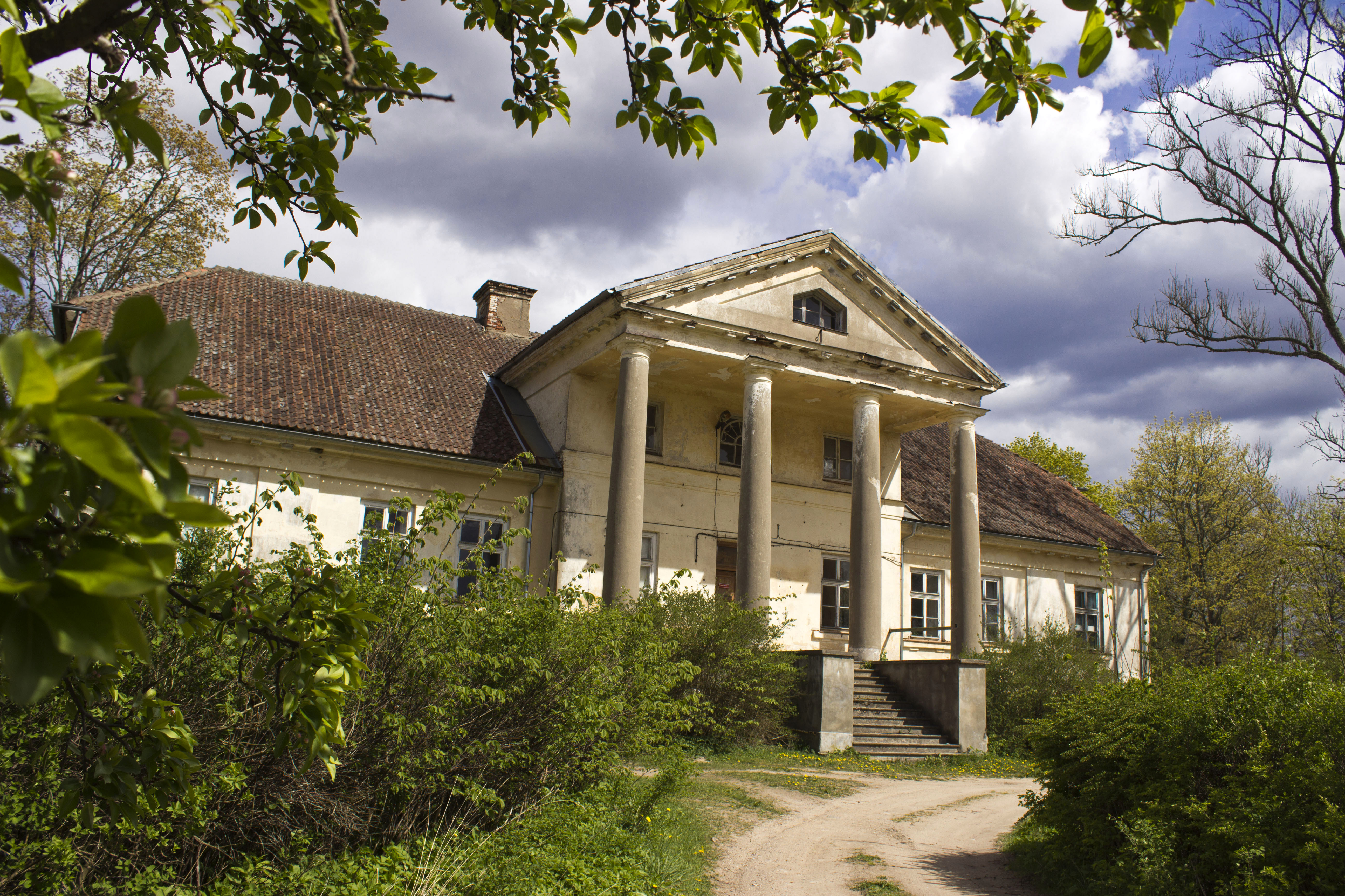 Padures muiža / manor